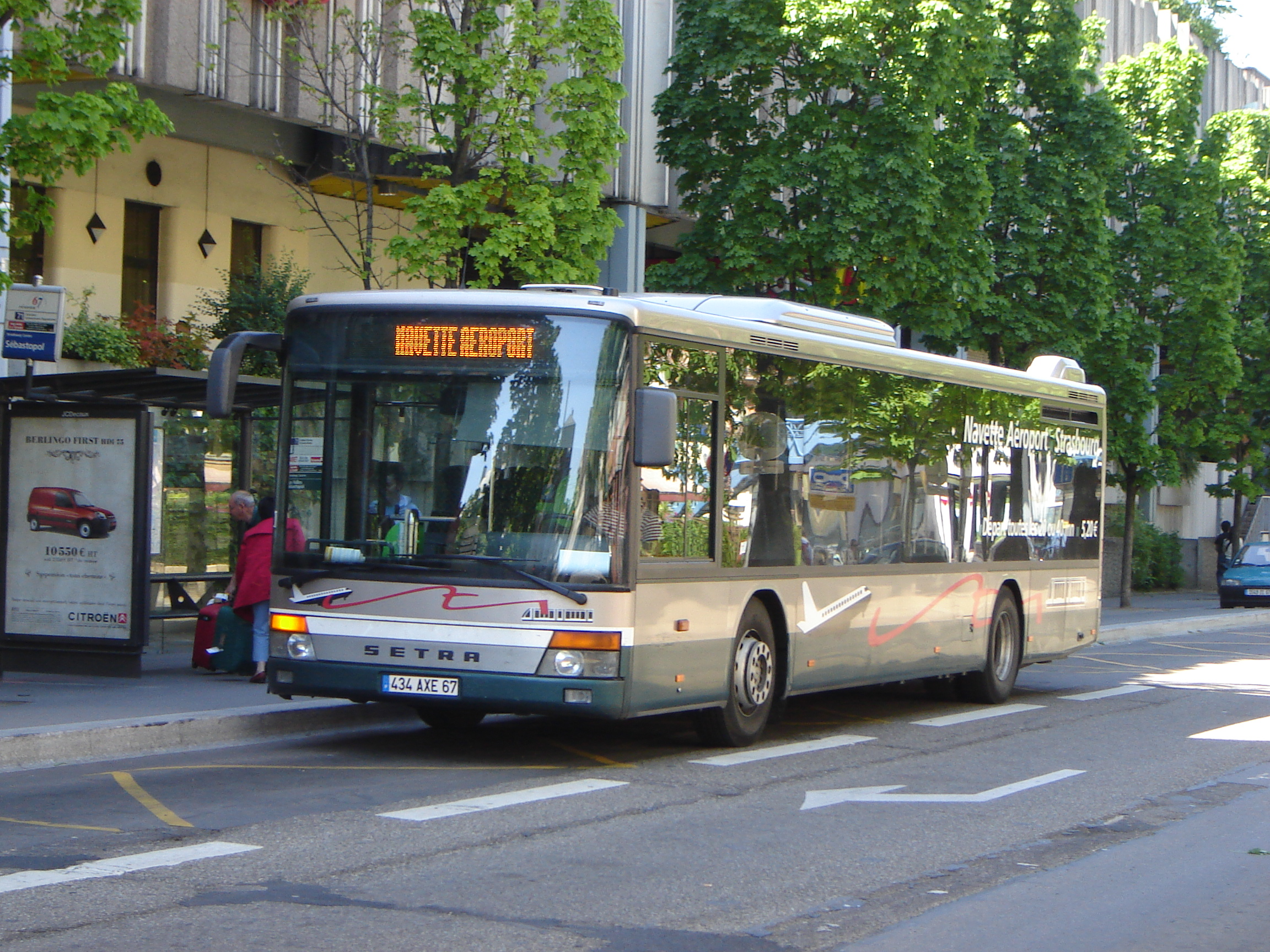 S 315 NF de l'ancienne Navette aéroport à Strasbourg